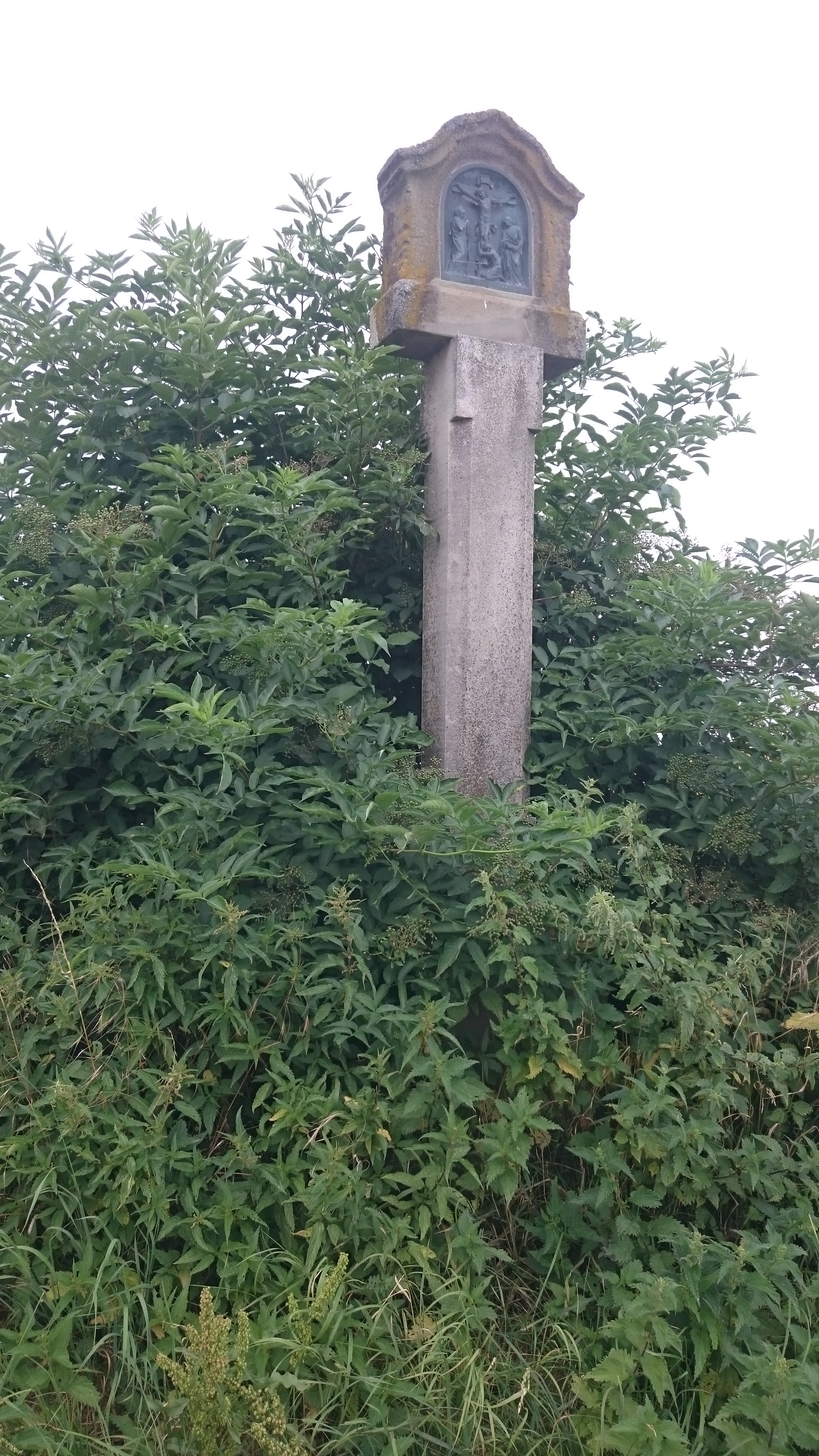 Bildstock bei Bieringen (Schöntal)